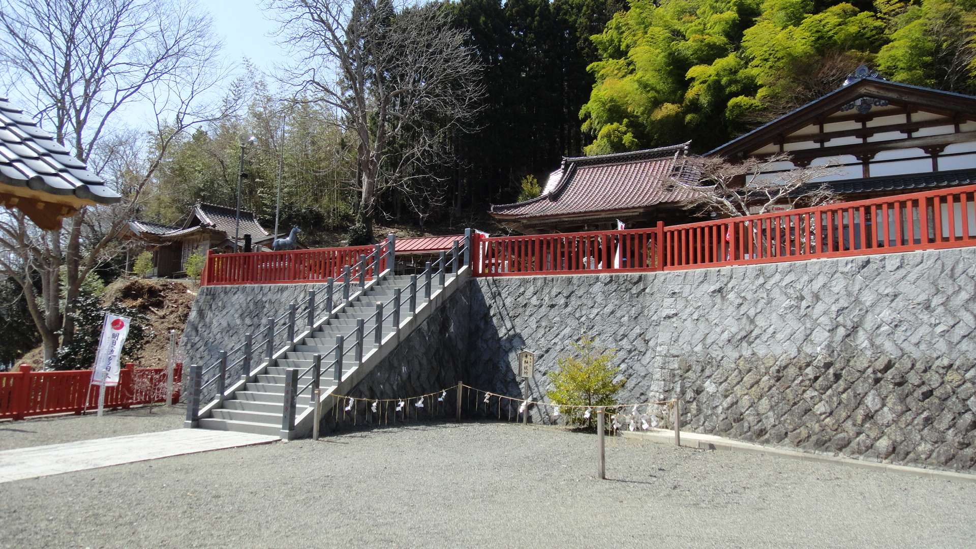 気仙沼市唐桑町の早馬神社社殿